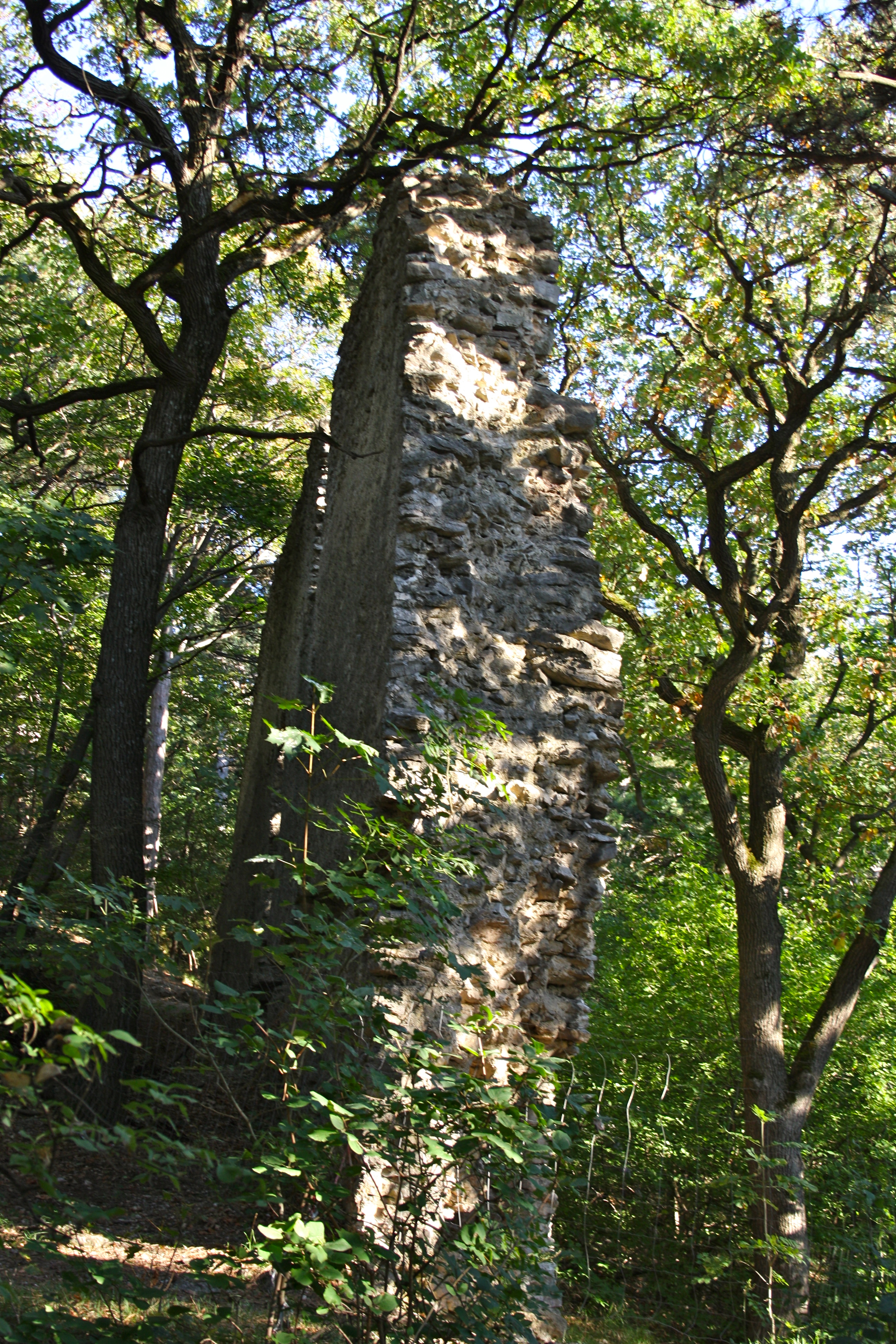 Burgruine Kammerstein in Perchtoldsdorf.